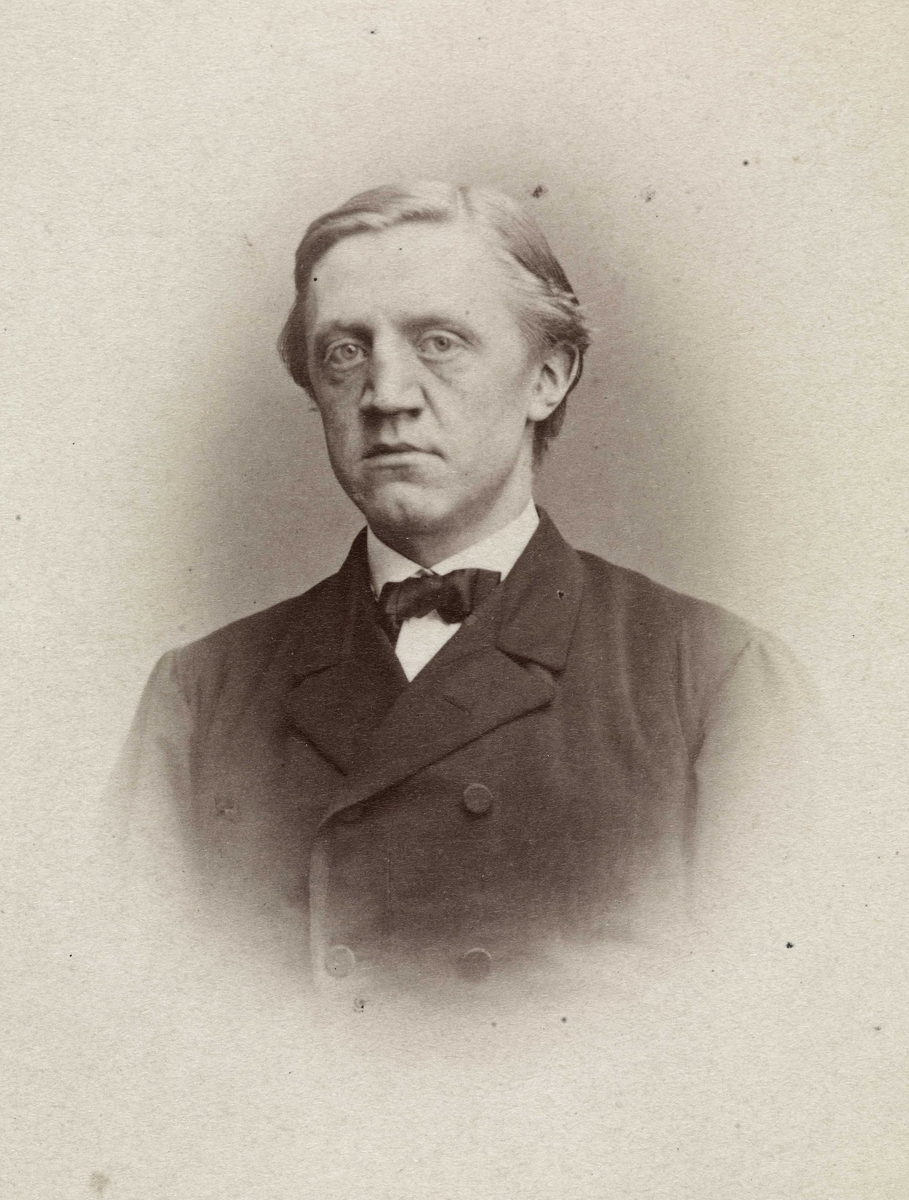 Høyesterettsadvokat Ernst Motzfeldt, ca. 1870-1880.